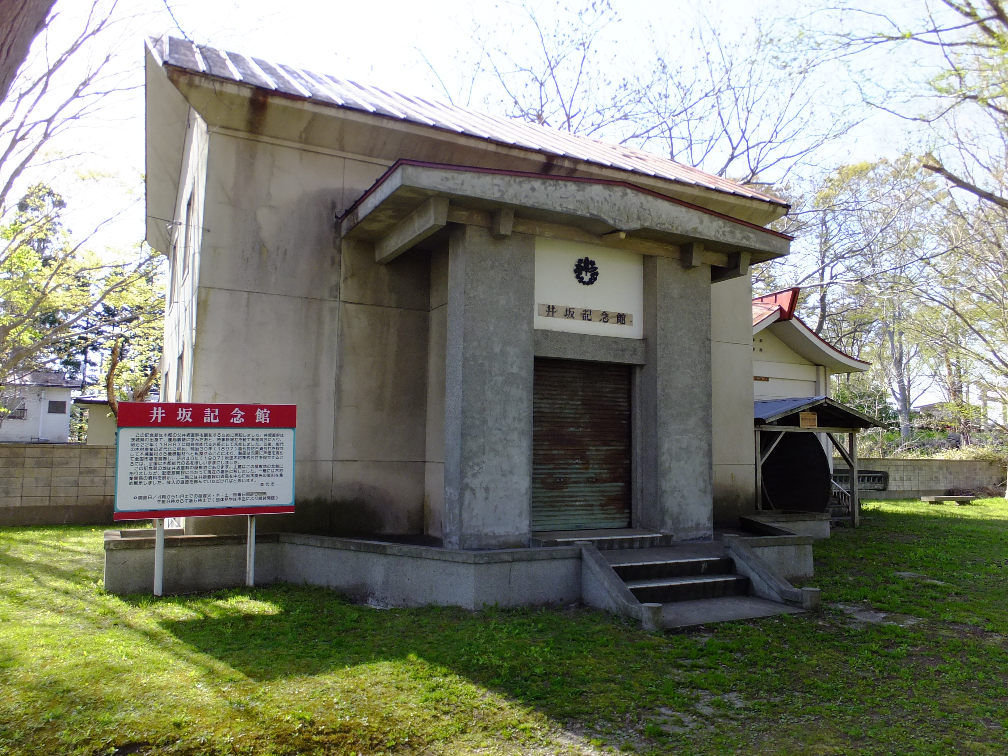 秋田県能代市、井坂街区公園内にある井坂記念館。秋田杉製材技術の近代化に尽力し、木都・能代の発展に大いに貢献した実業家・井坂直幹を顕彰する為に建設された。